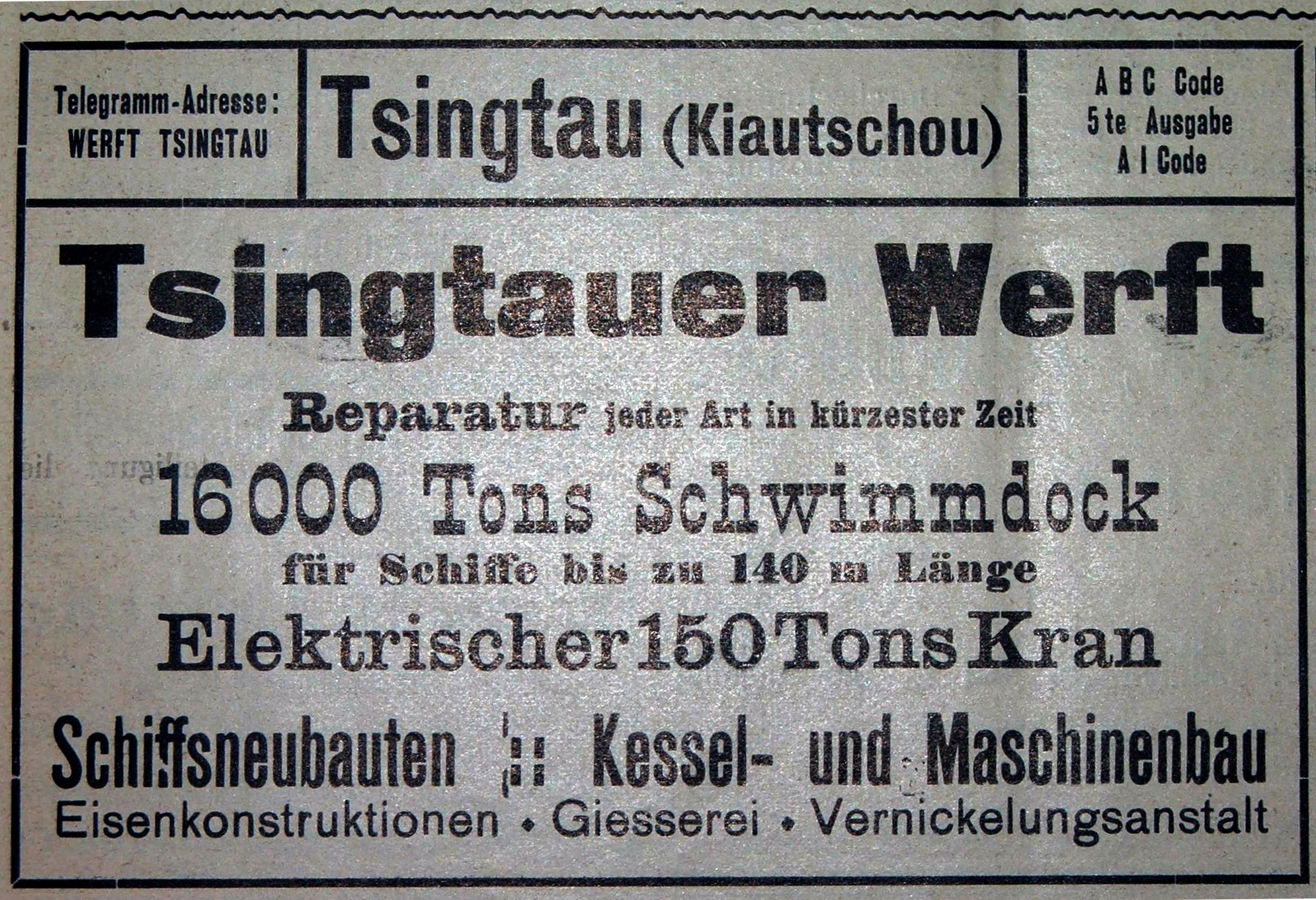 Alte Werbung aus der Fachzeitschrift "Hansa", Jahrgang 1913